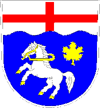 Javornice - znak obce.